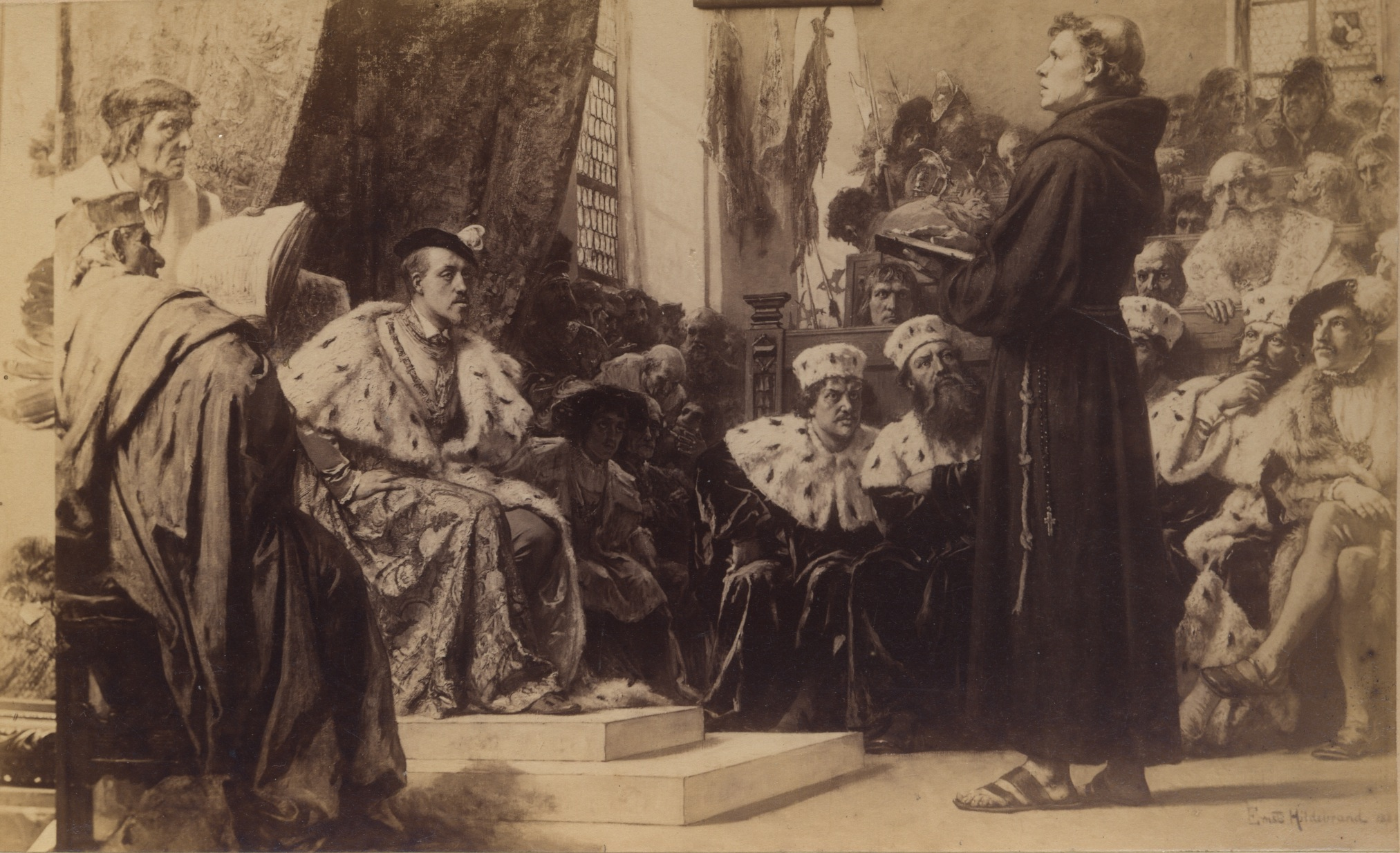 Martin Luther vor dem Kaiser auf dem Reichstag zu Worms